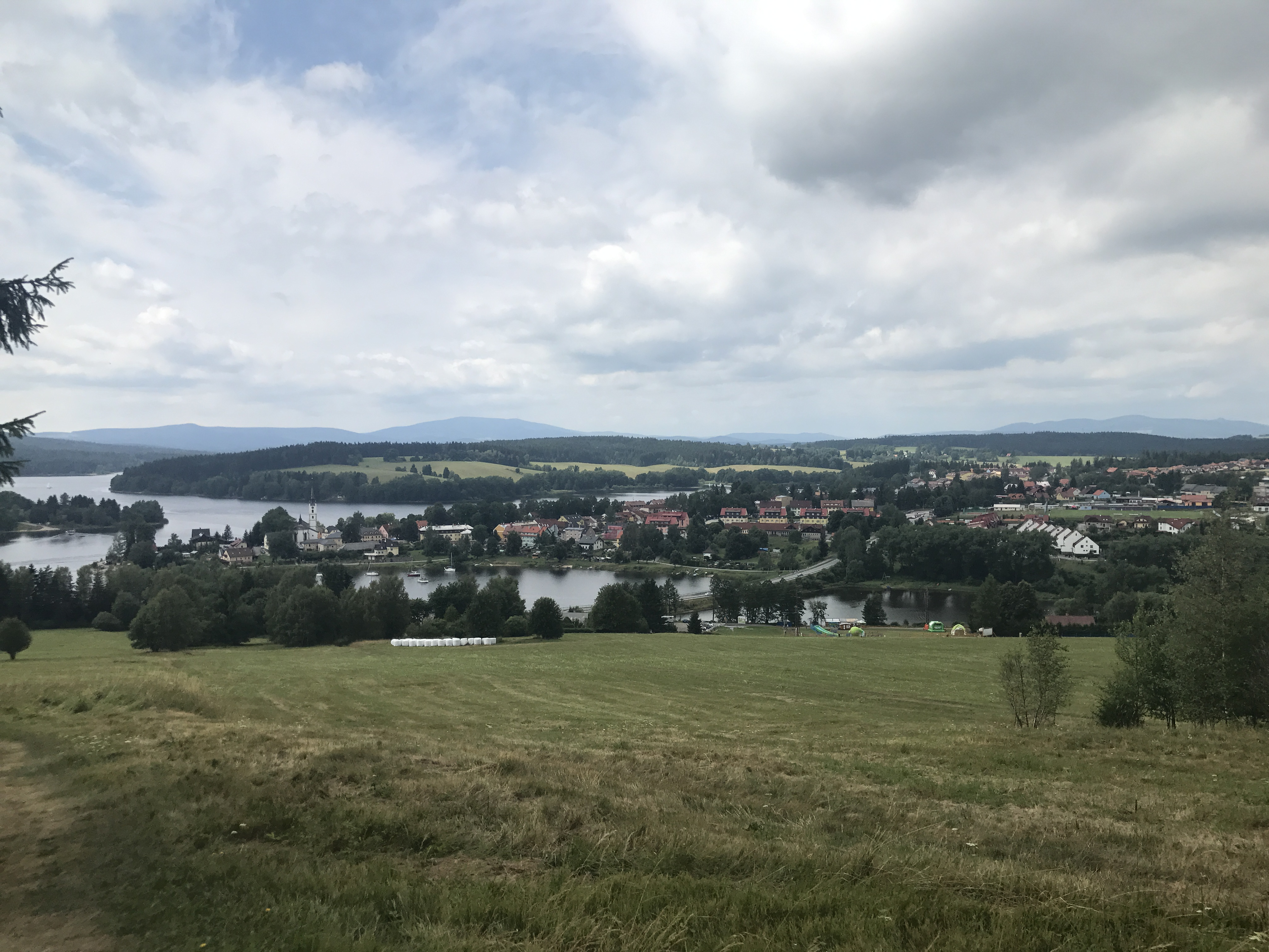 Frymburk při pohledu z kopce Na Martě